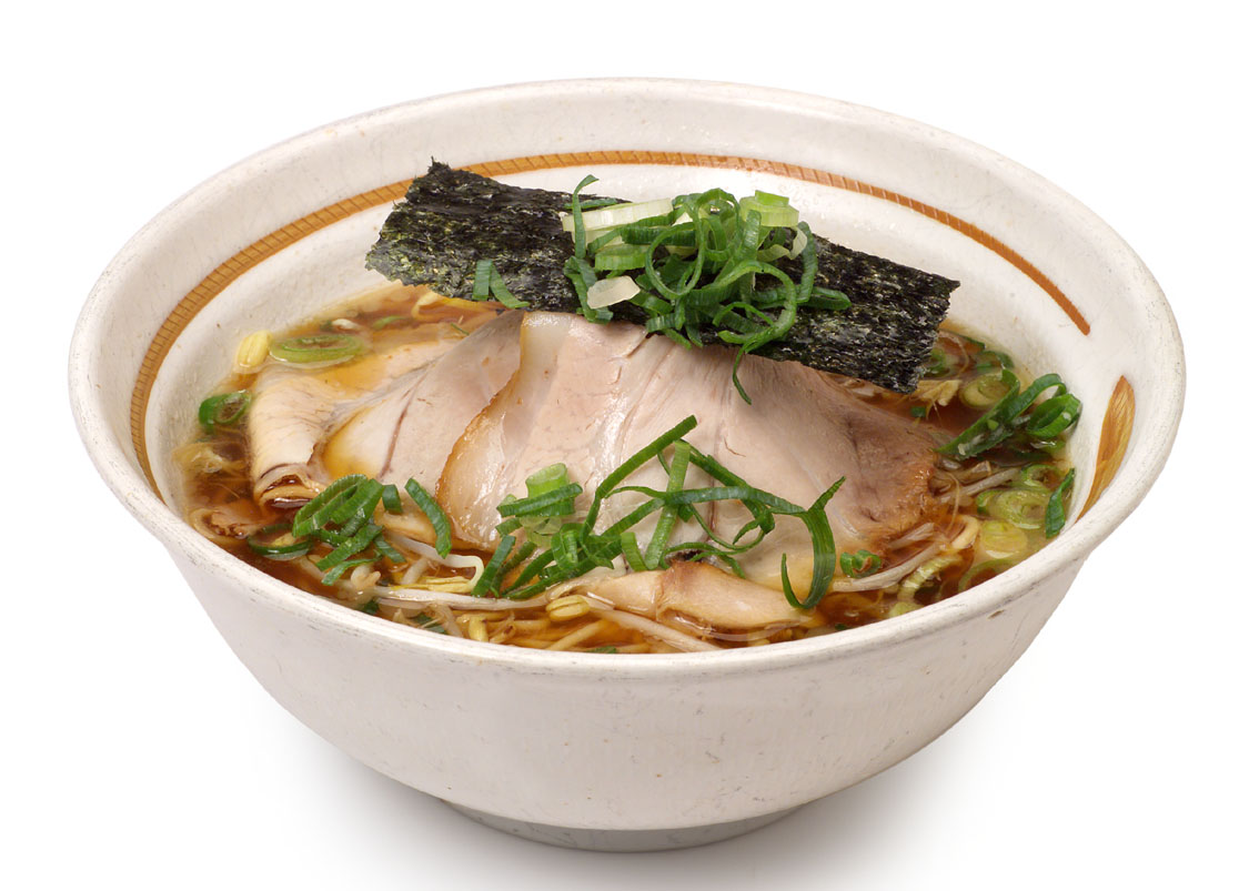 「姫路ラーメン」の名付け親は「姫路・播磨、らーめん・点心応援会」で、現在は「らーめん八角」や「餃子屋七星」などを中心に地元の特産ラーメンとして、PR活動の幅を広げている。